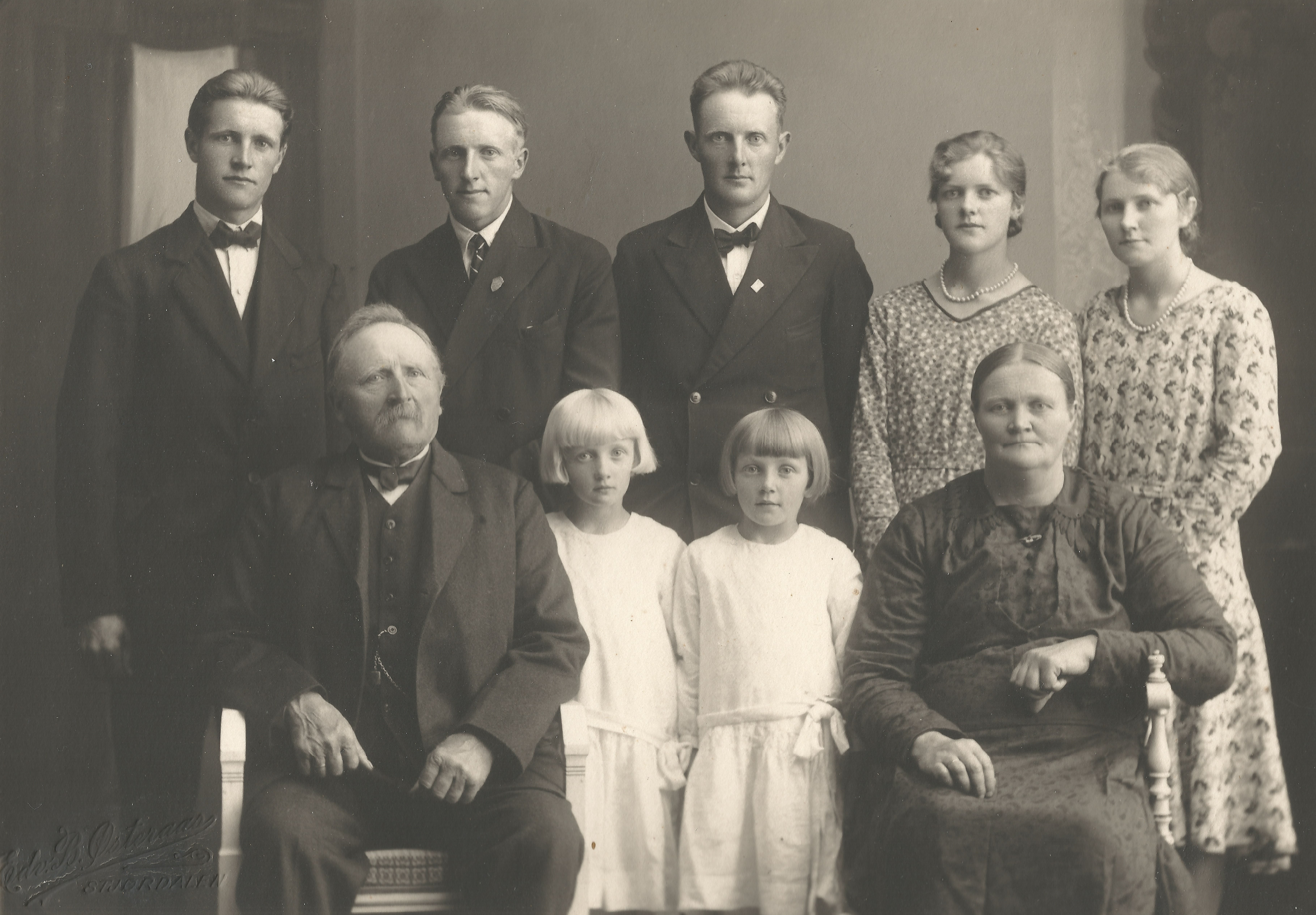 Gårdbruker Johan Larsen Fløan (1859–1945) og hustru Gusta Oline (født Røkke) (1881–1961) med barn: Bak fra venstre Sigurd, John, Lars, Dagrun og Eldbjørg. Foran i midten: Gunvor og Johanna.